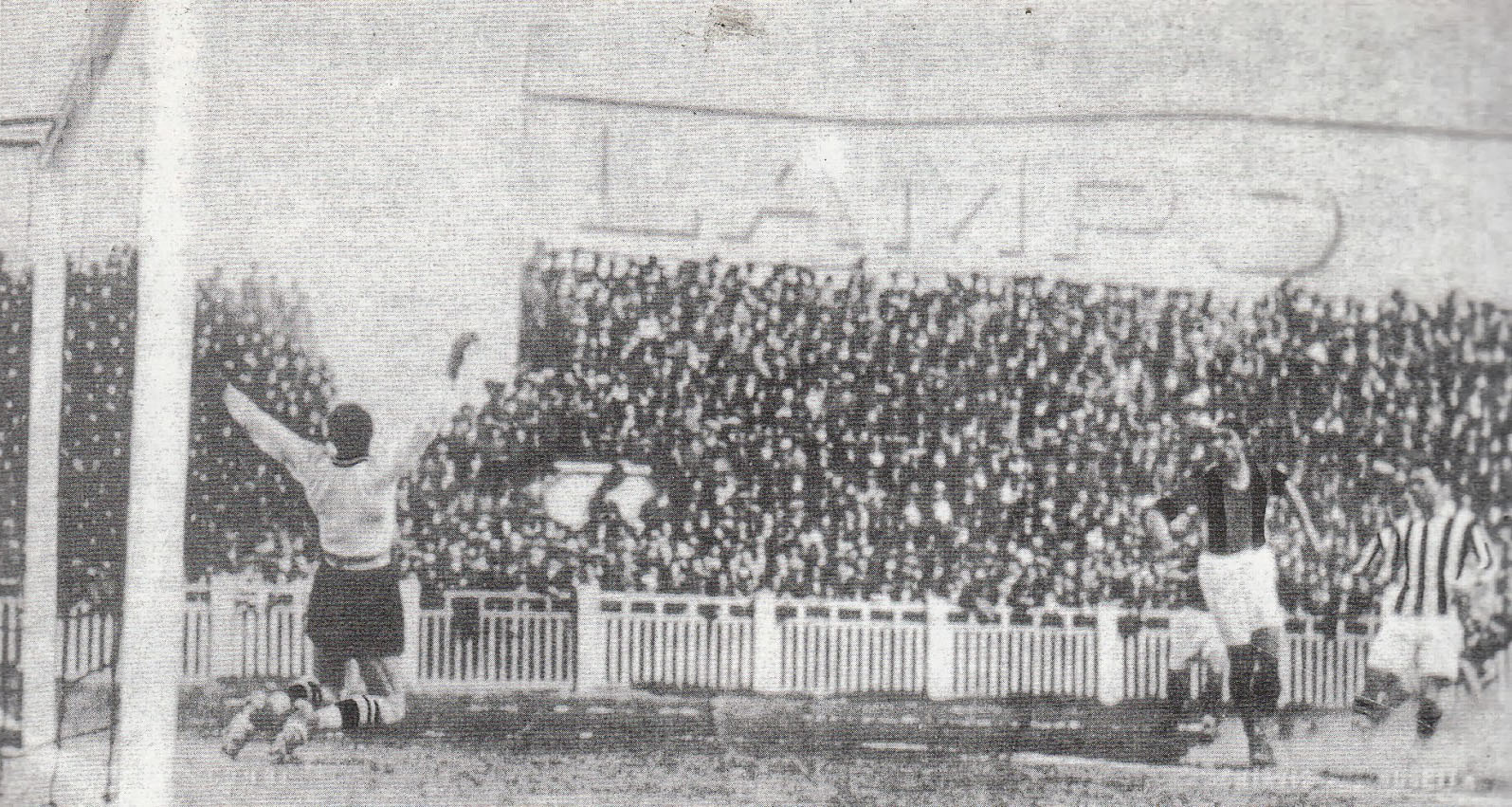 Torino, stadio di Corso Marsiglia ("Campo Juventus"), 14 aprile 1929. Il portiere bianconero Gianpiero Combi (a sinistra) non riesce a opporsi al tiro del centravanti rossoblù Angelo Schiavio (a destra) nella sfida tra Juventus e Bologna (1-1) valevole per la 22ª giornata del campionato italiano di Divisione Nazionale 1928-29, girone B; alle spalle di Schiavio, il terzino bianconero Virginio Rosetta (all'estrema destra) osserva l'azione.